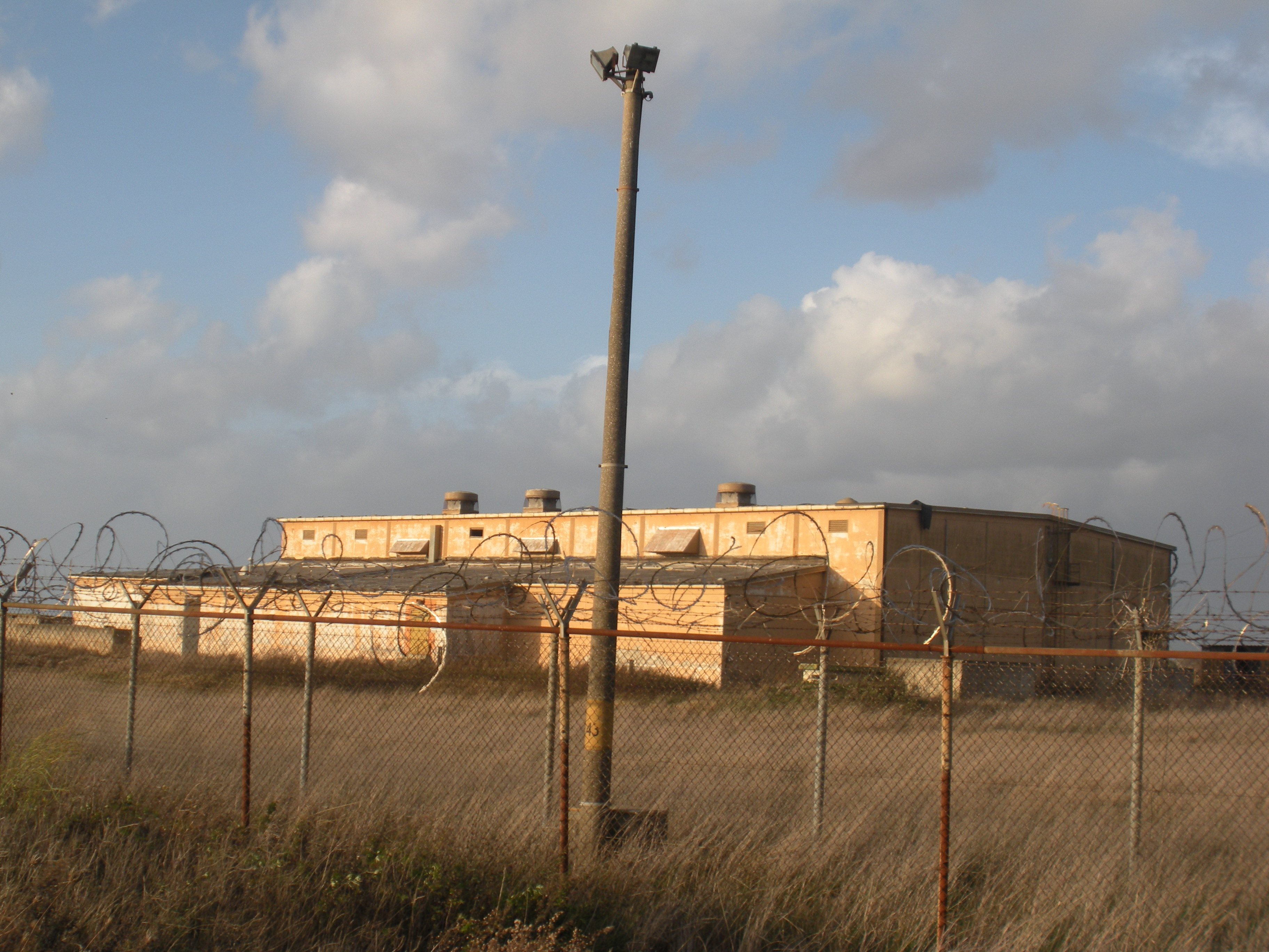 foto della base